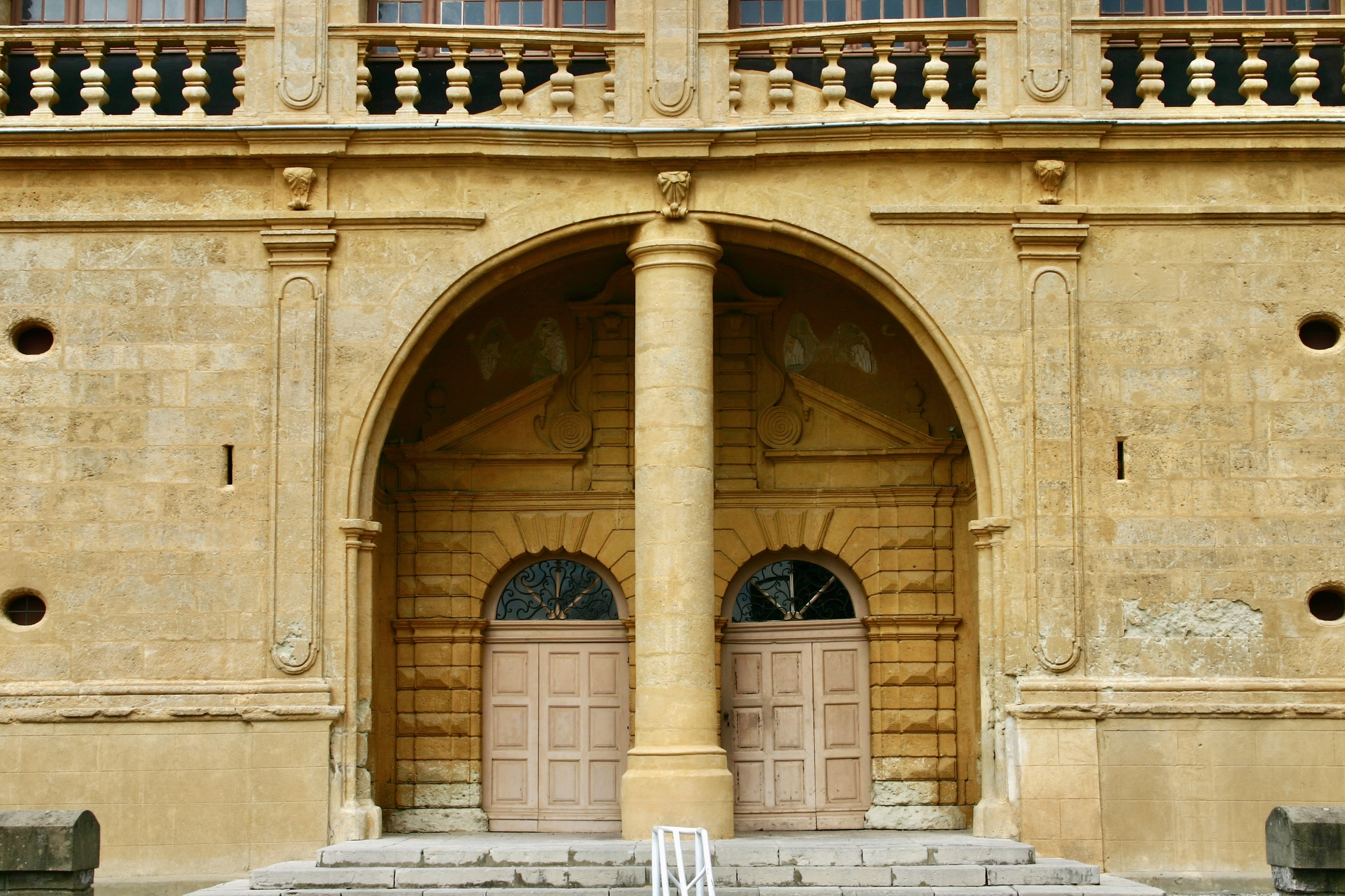 Façade de l'église Notre-Dame-de-Grâce de Gignac (département de l'Hérault, France). Copyright (c) 2006 David Farreny. Permission vous est donnée de copier, distribuer et/ou modifier ce document selon les termes de la Licence GNU Free Documentation License, Version 1.2 ou ultérieure publiée par la Free Software Foundation ; sans sections inaltérables et sans pages de couverture. [1] Permission is granted to copy, distribute and/or modify this document under the terms of the GNU Free Documentation License, Version 1.2 or any later version published by the Free Software Foundation; with no Invariant Sections, no Front-Cover Texts, and no Back-Cover Texts. [2]